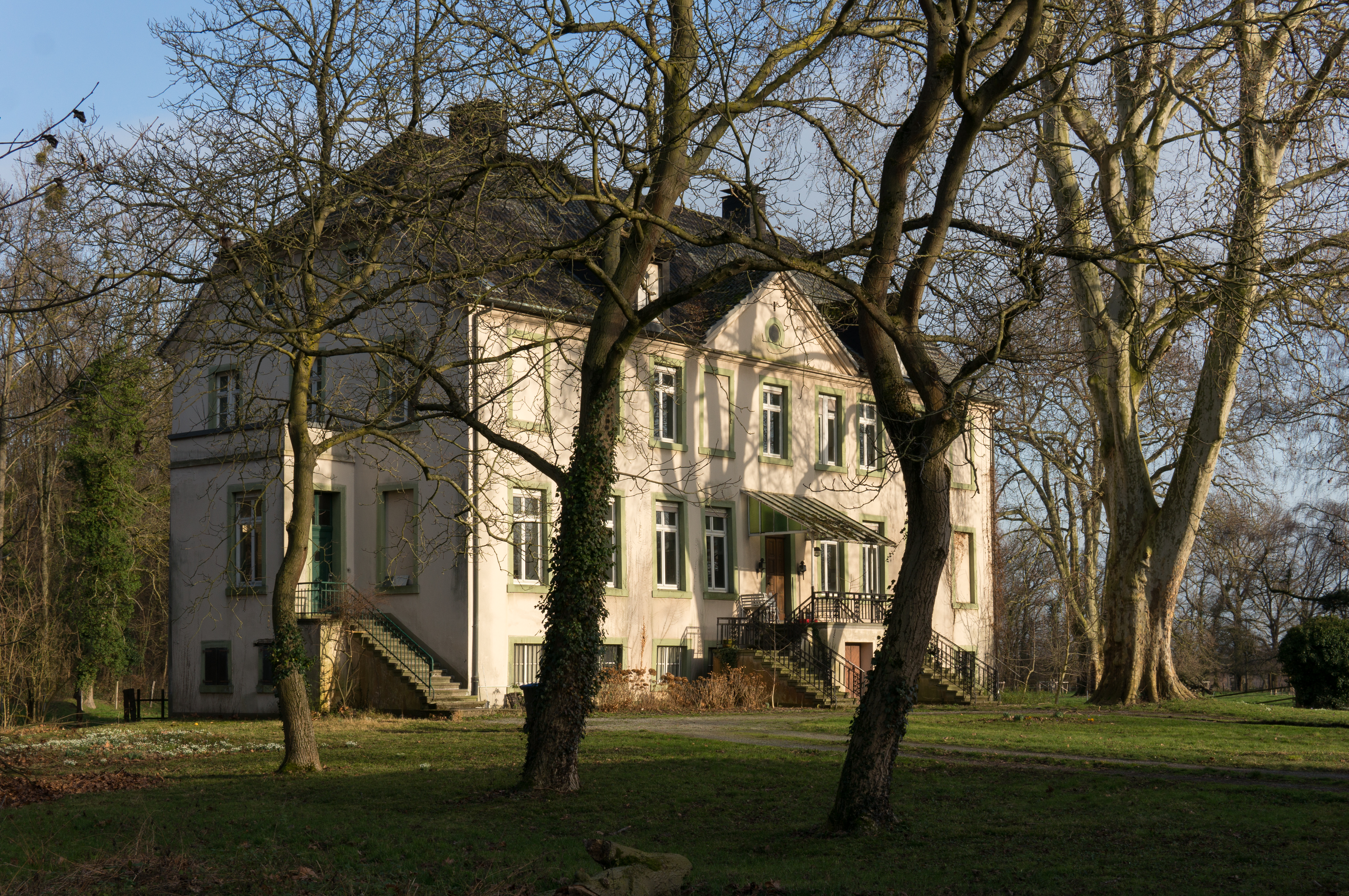 Haus Borg in Werl-Budberg, Vorderseite, Blick von Nordwesten